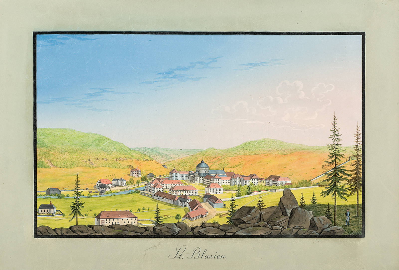 «St. Blasien». Gouache auf Papier. Unsigniert. 22,8 x 36,4 cm (Darstellung)